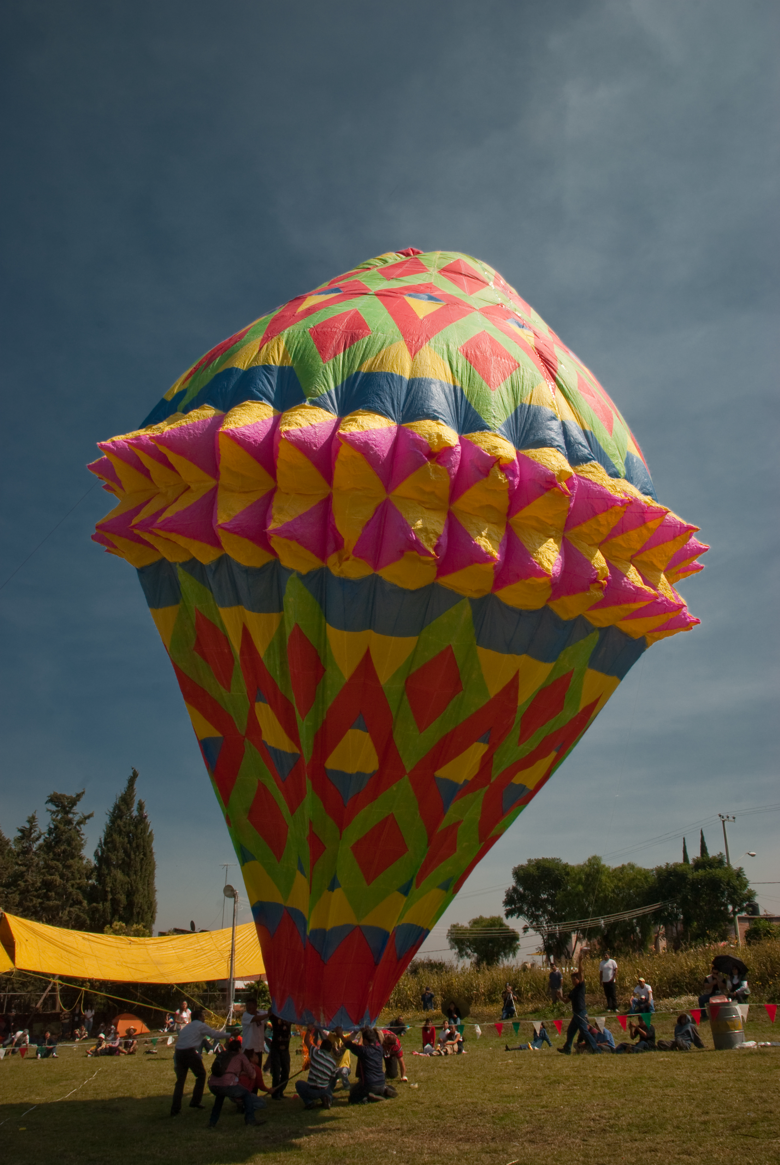 En Ohtenco, Milpa Alta. La dedicación que los diversos equipos ponen para hacer y elevar sus globos es digna de admirarse. Este globo fue elaborado por un equipo de Zozocolco, Veracruz y estaba fomado por más de mil pliegos. El próximo fin de semana (Sábado 07 y Domingo 08 de Noviembre) Zozocolco tendrá su propio Concurso Nacional. Si te interesa asistir visita